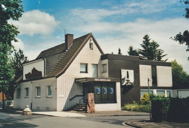 Das Fritz-Winter-Haus in Ahlen